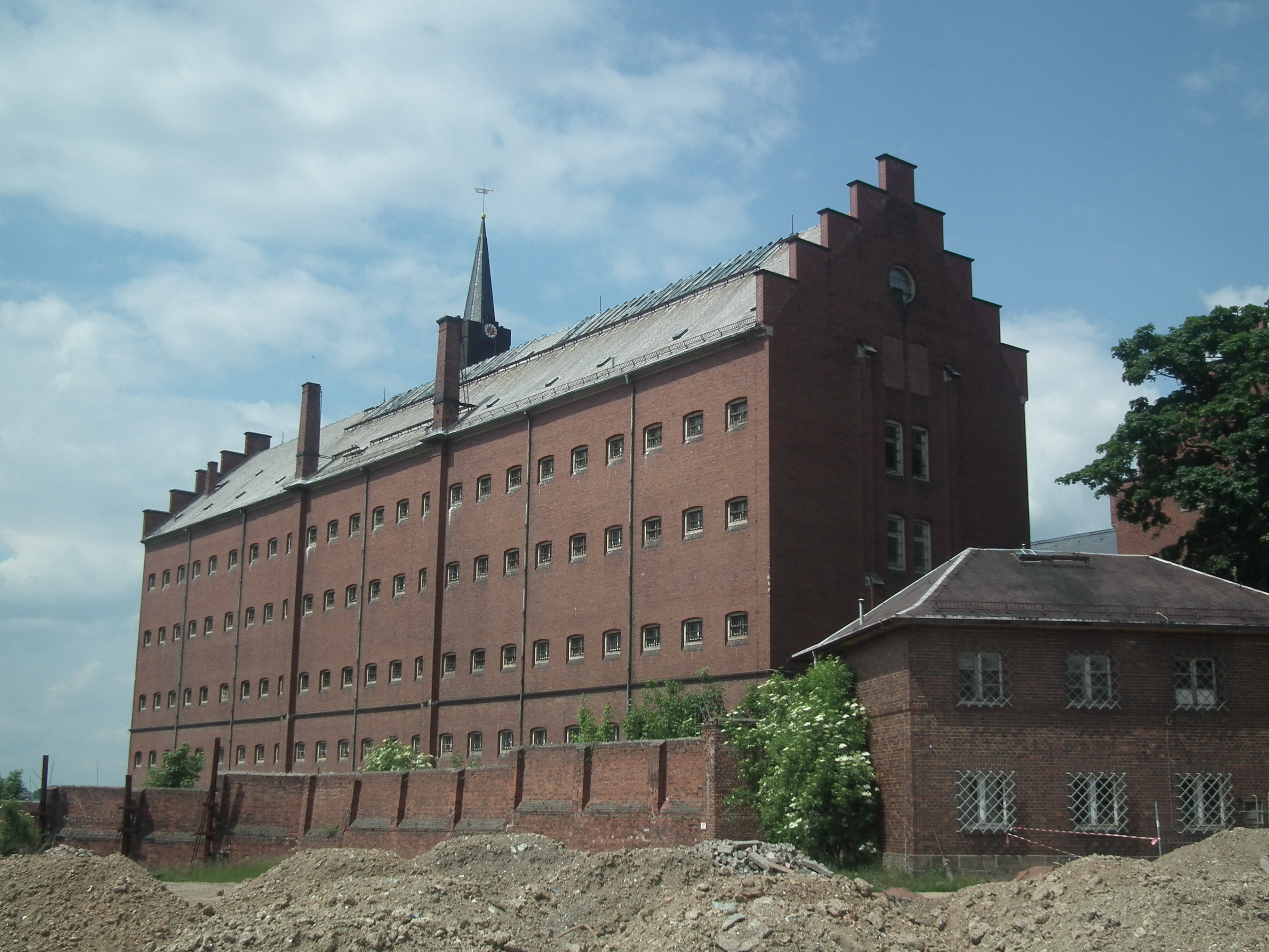 Frauengefängnis Hoheneck in Stollberg/Erzgeb. in Sachsen